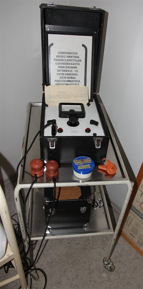 Sähköhoitoon tai sähköšokkihoitoon eli elektrokonvulsiiviseen hoitoon(ECT) aiemmin käytetty laitteisto Tuusulan Kellokosken sairaalan museossa.